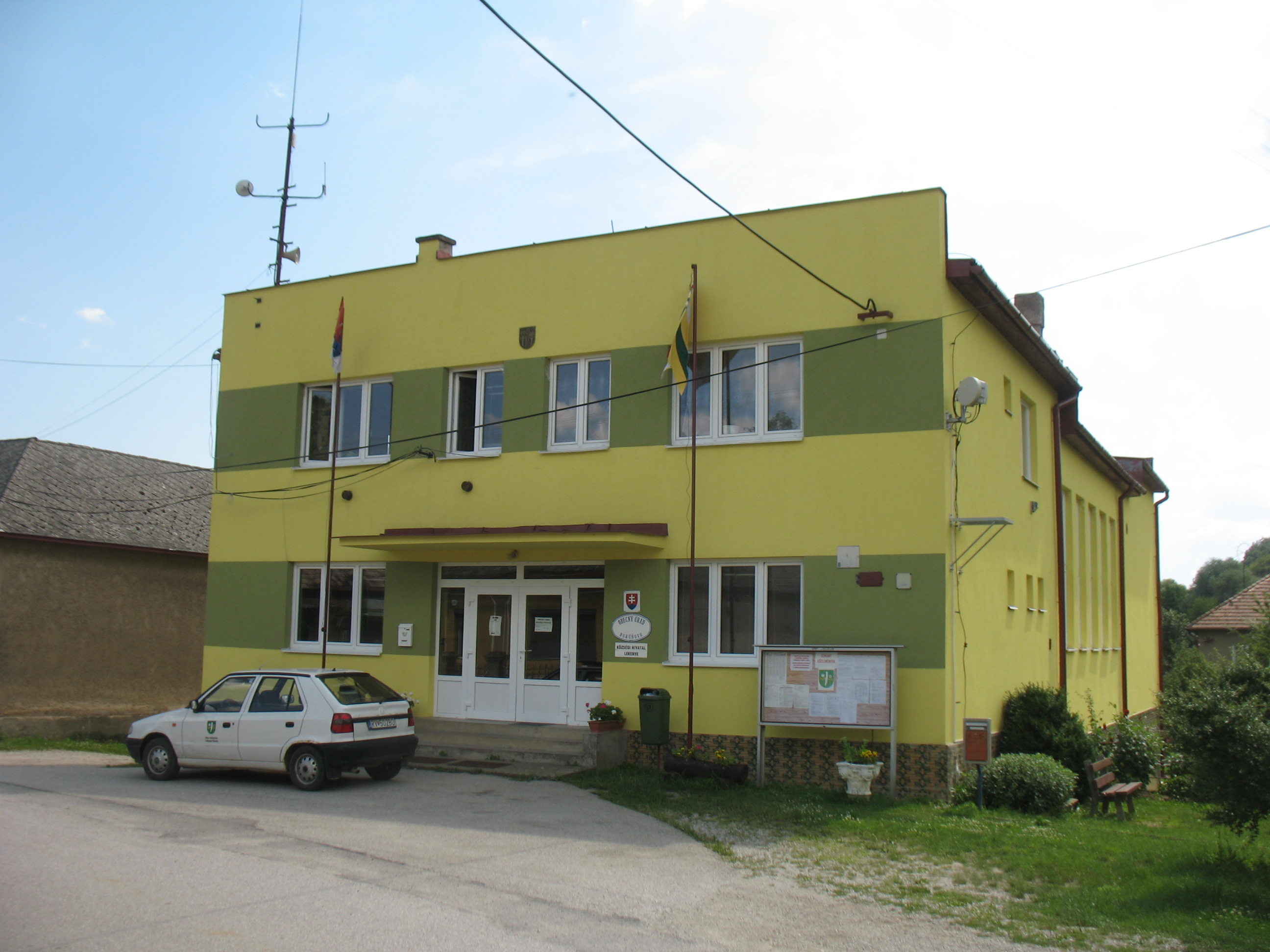 Lekenye